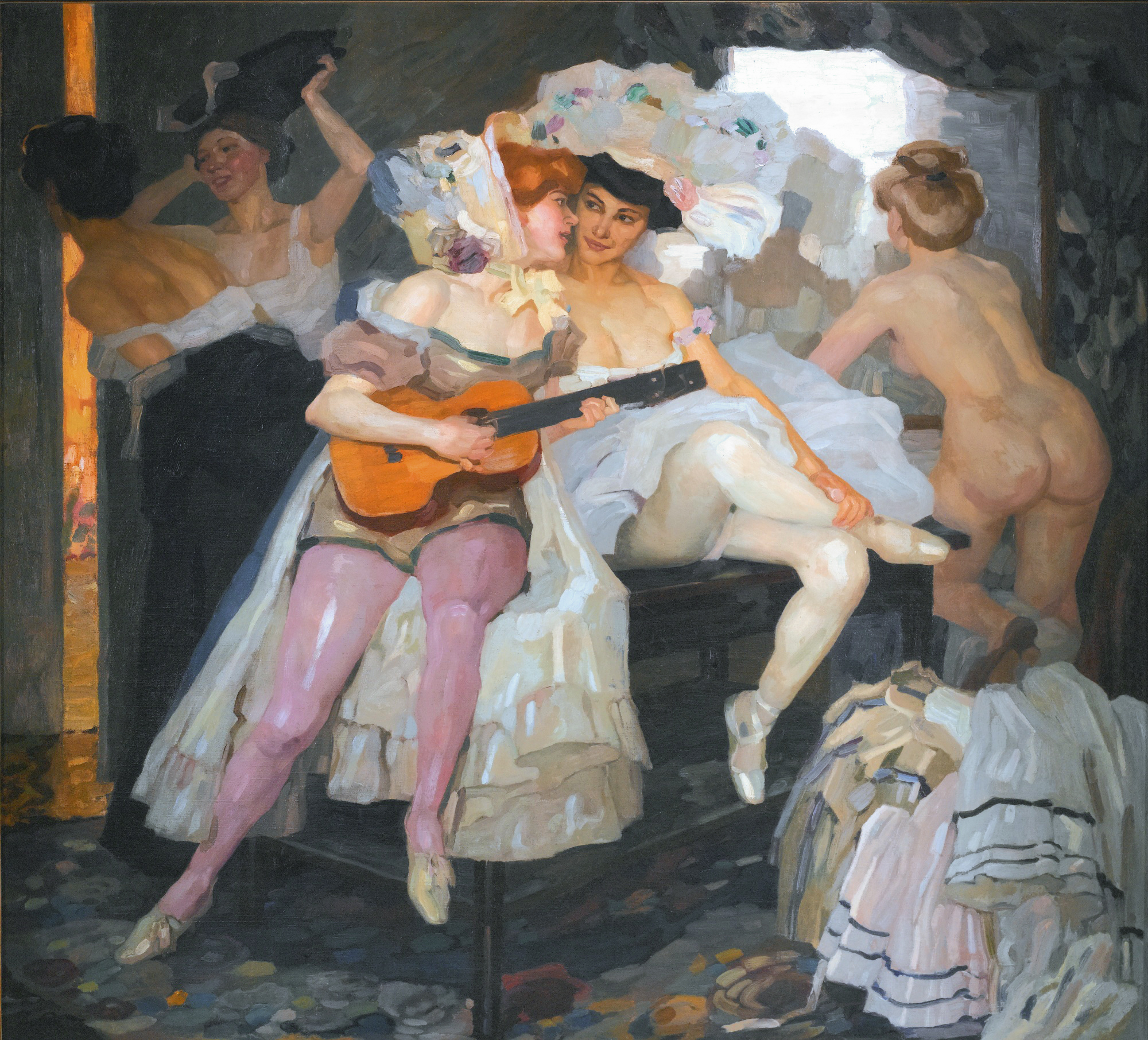 Hinter den Kulissen